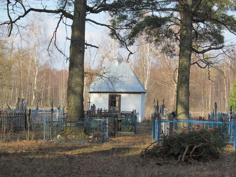 Ленін (Жыткавіцкі раён). Капліца